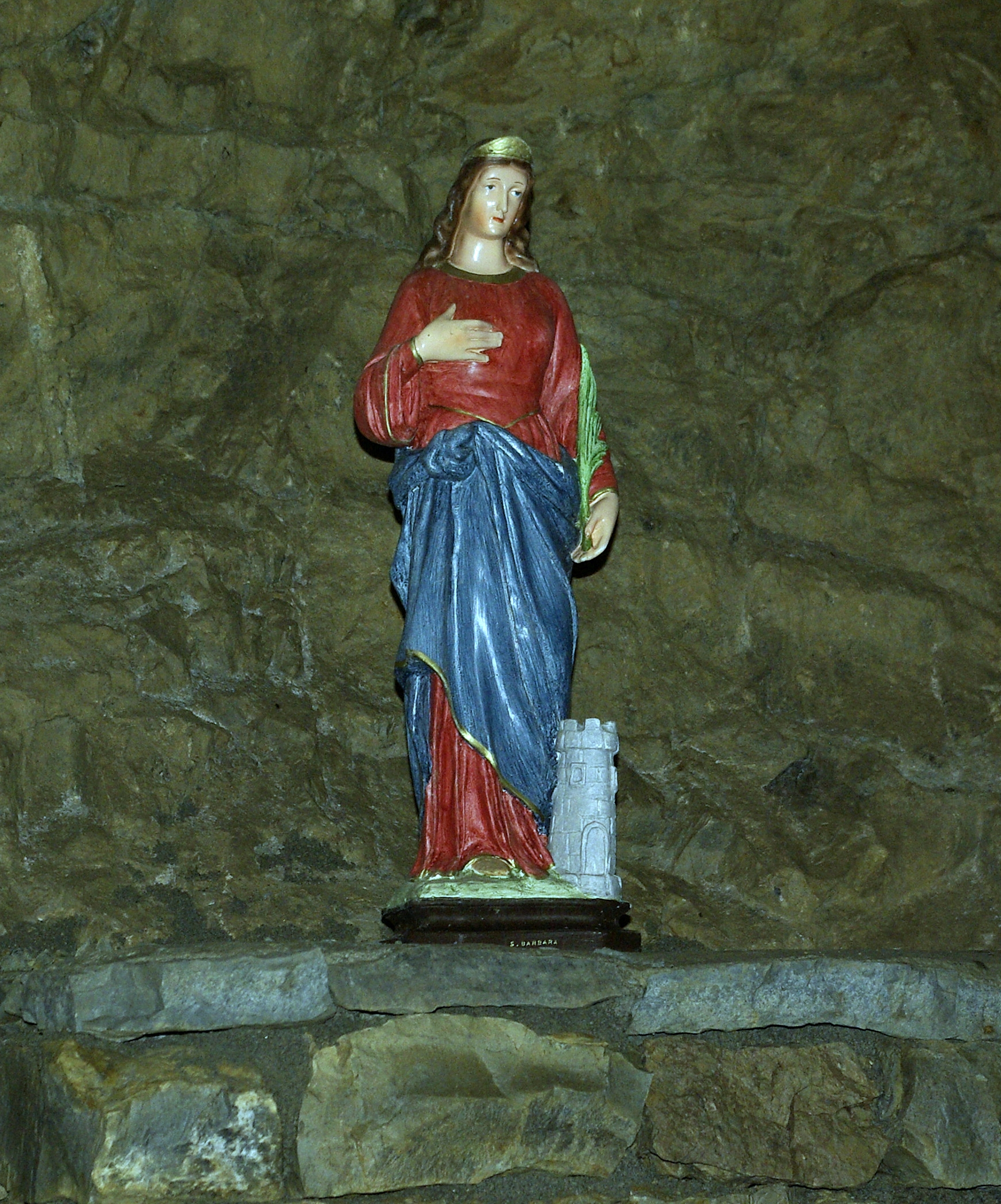 Statua Santa Barbara ingresso miniera dei piani di Resinelli (Lecco)